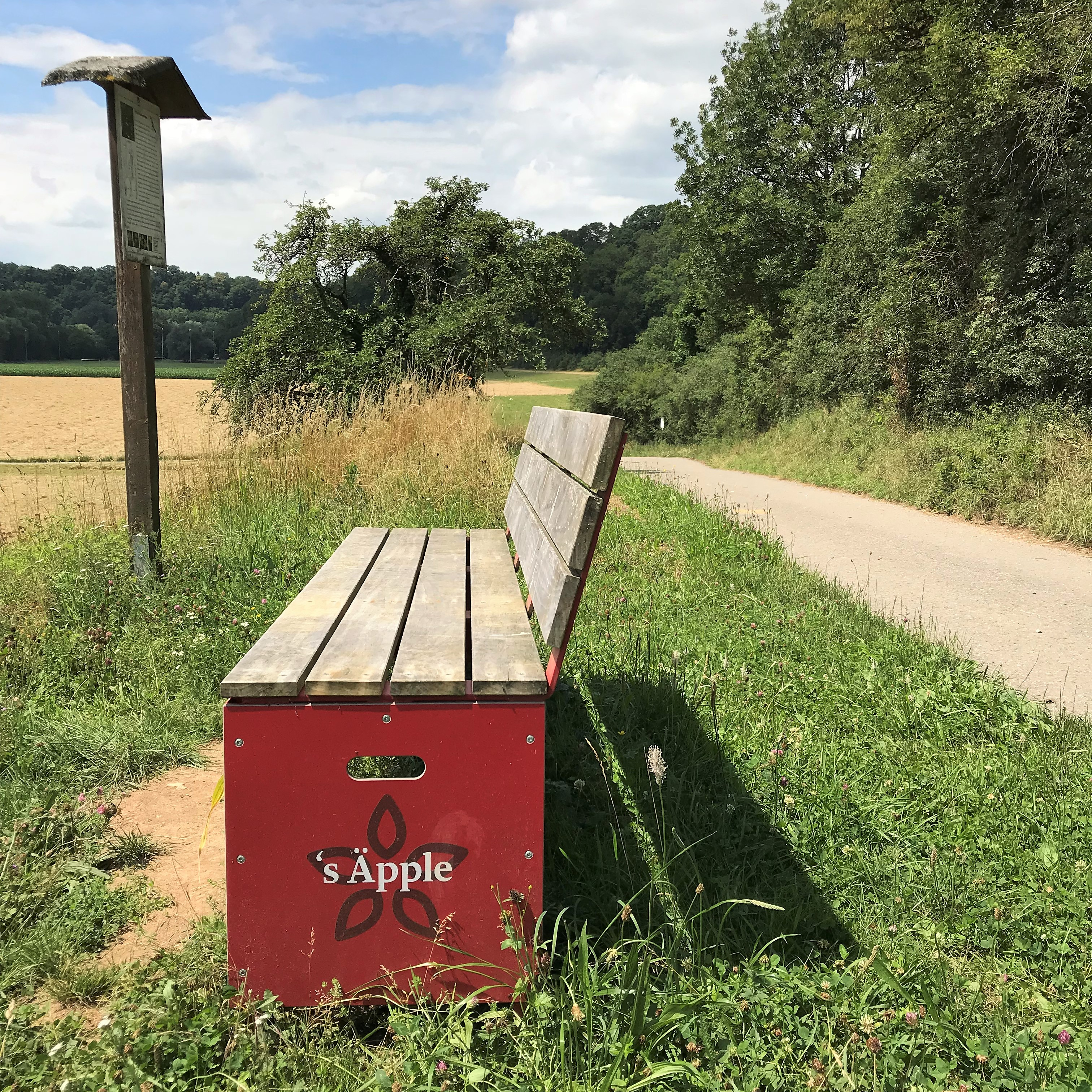 Ruhebank mit aufgezeichnetem Wegweiser des Rundwanderwegs s'Äpple